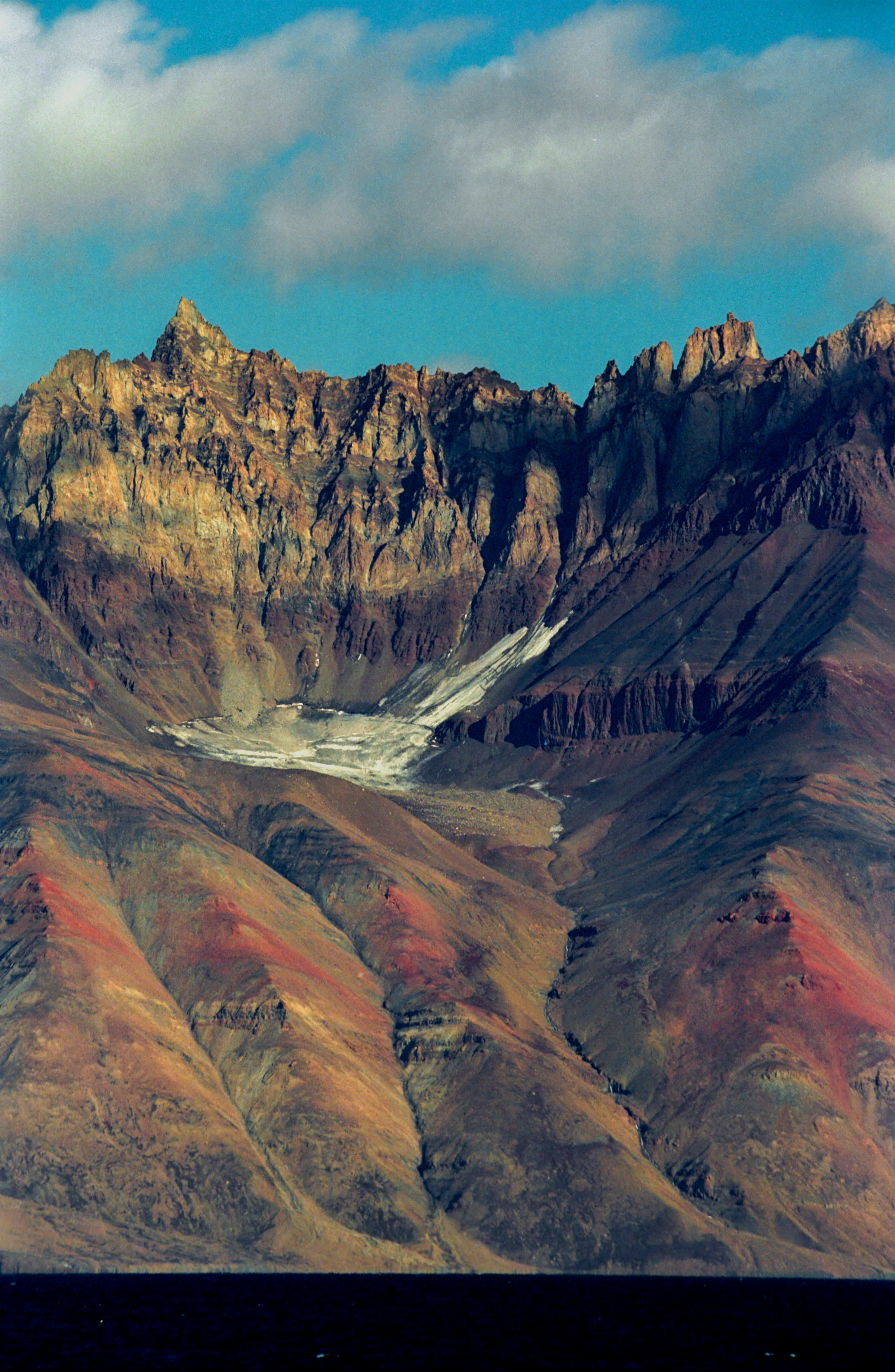 Krajobraz wyspy Ymers widziany z Franz Jozef Fiord